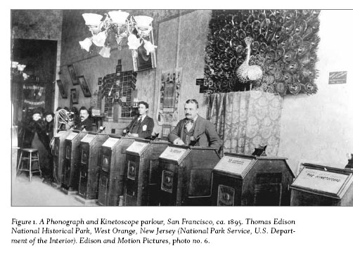 exemple de salle de visionnage du kinetoscope